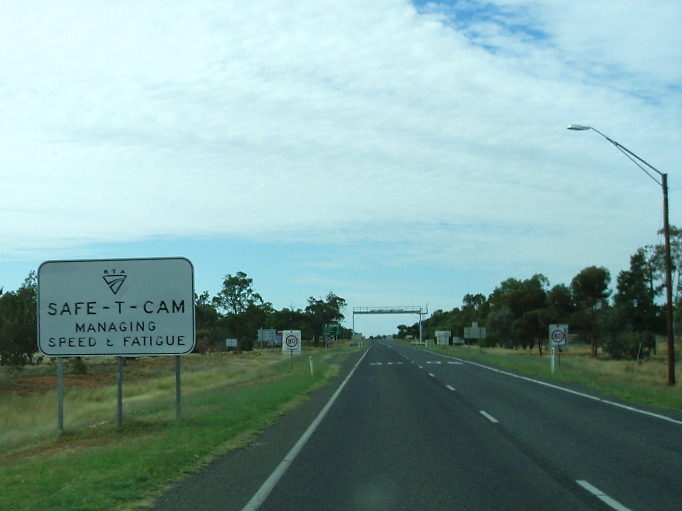 Safe-t-cam